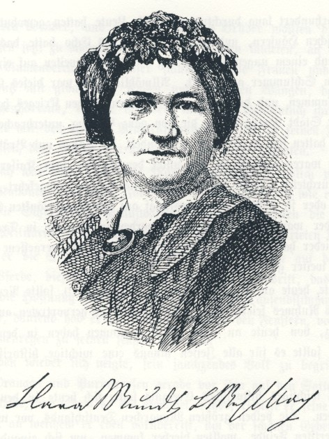 Portrait der deutschen Schriftstellerin Klara Mundt, die unter dem Pseudonym Luise Mühlbach schrieb.